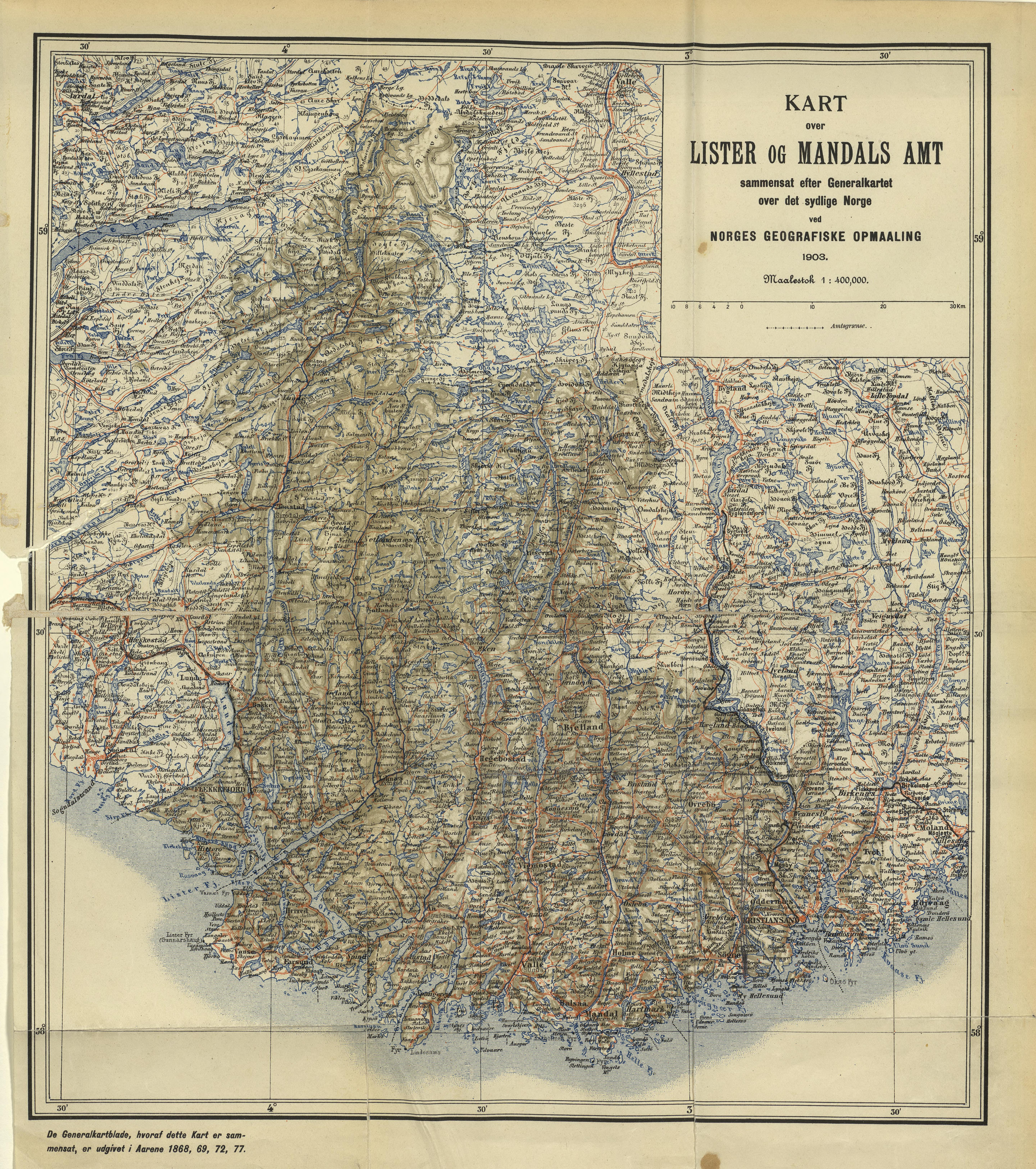 «Kart over Lister og Mandals Amt sammensat efter Generalkartet over det sydlige Norge ved Norges geografiske Opmaaling 1903». Fra Norges Land og Folk, Lister og Mandals Amt.